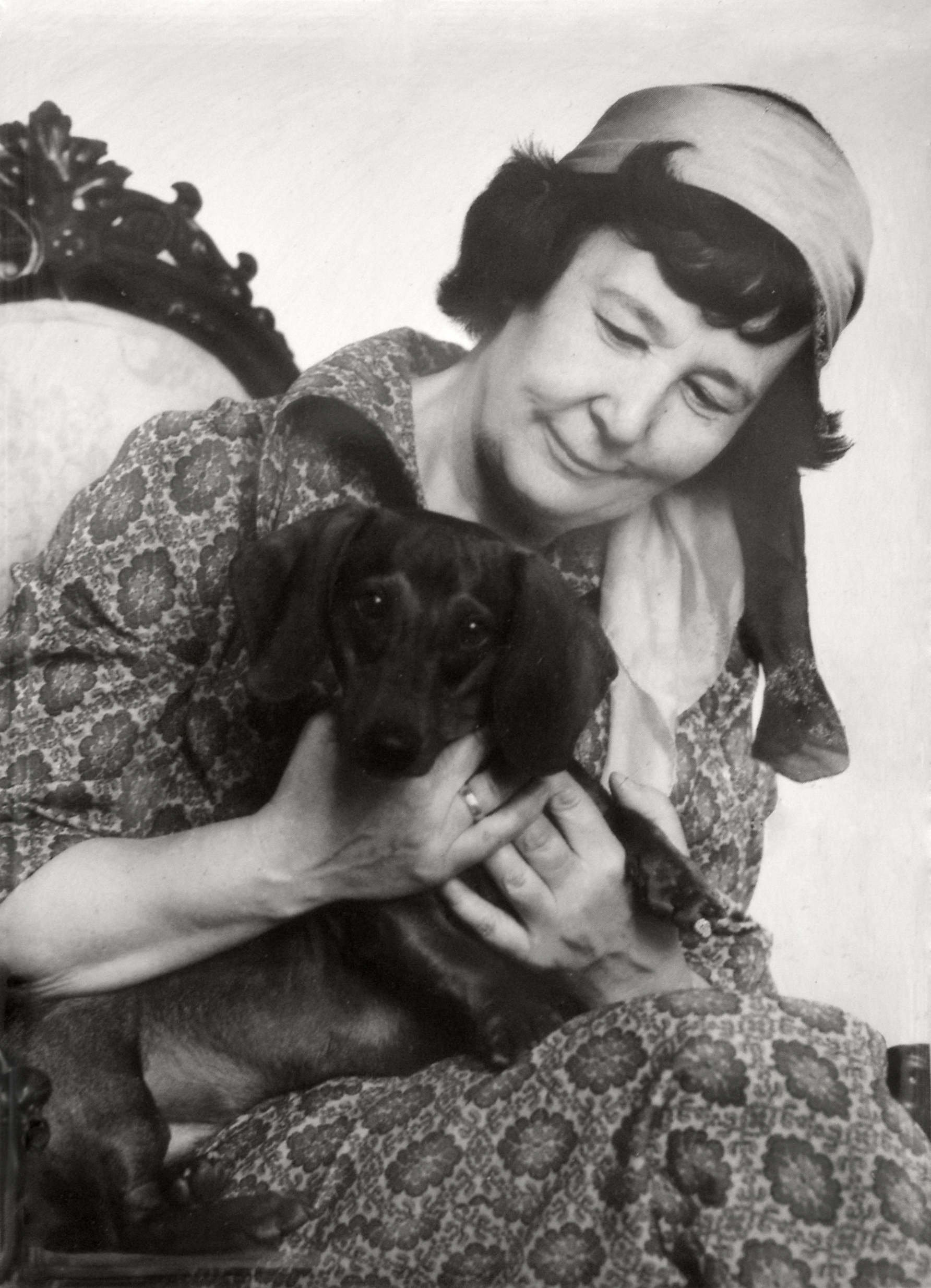 Grób seksuolog Michaliny Wisłockiej na Cmentarzu ewangelicko-augsburskim w Warszawie